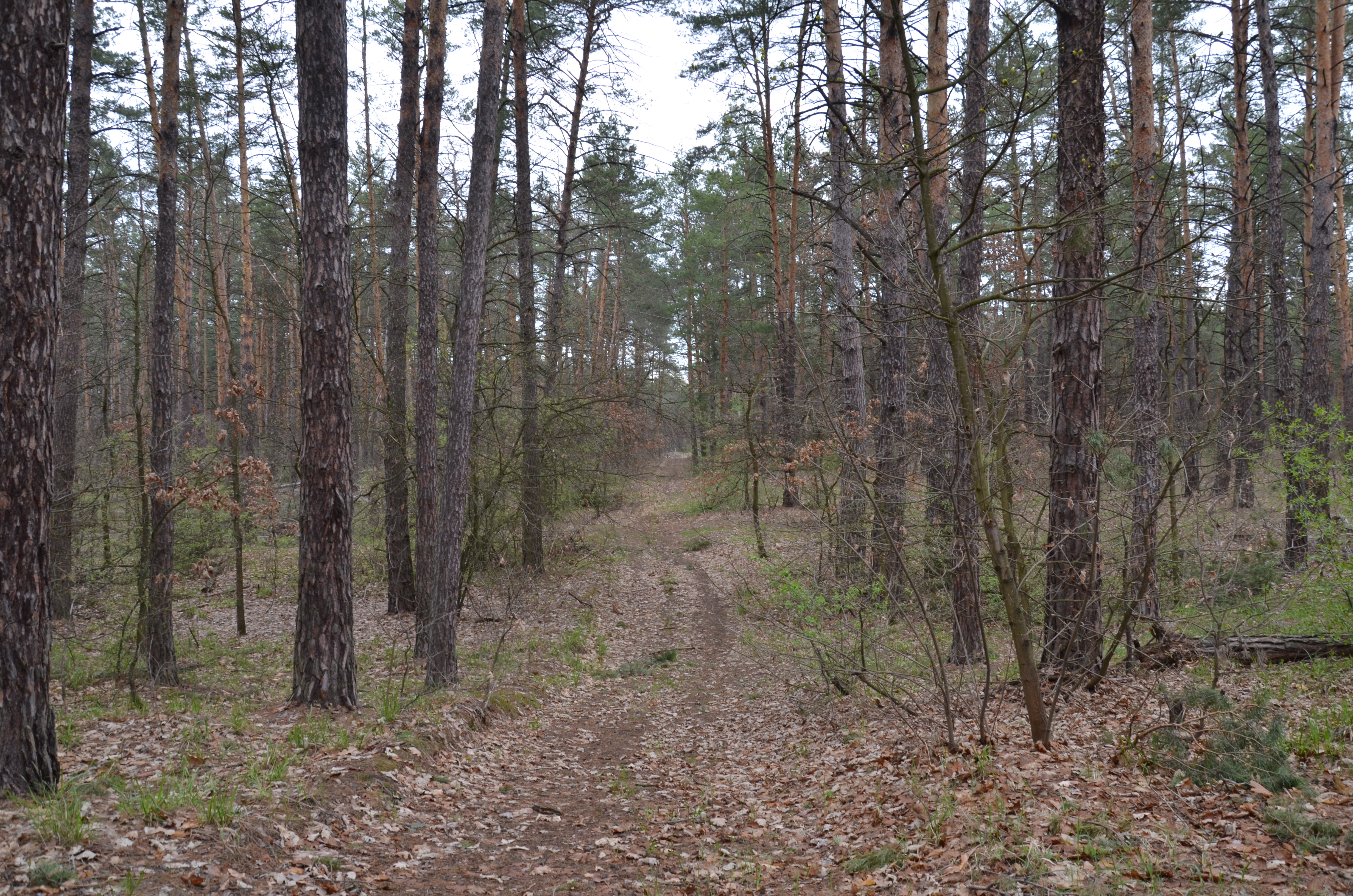 «Обухівський», Обухівський район, Обухівська та Українська міські ради, Козинська селищна рада